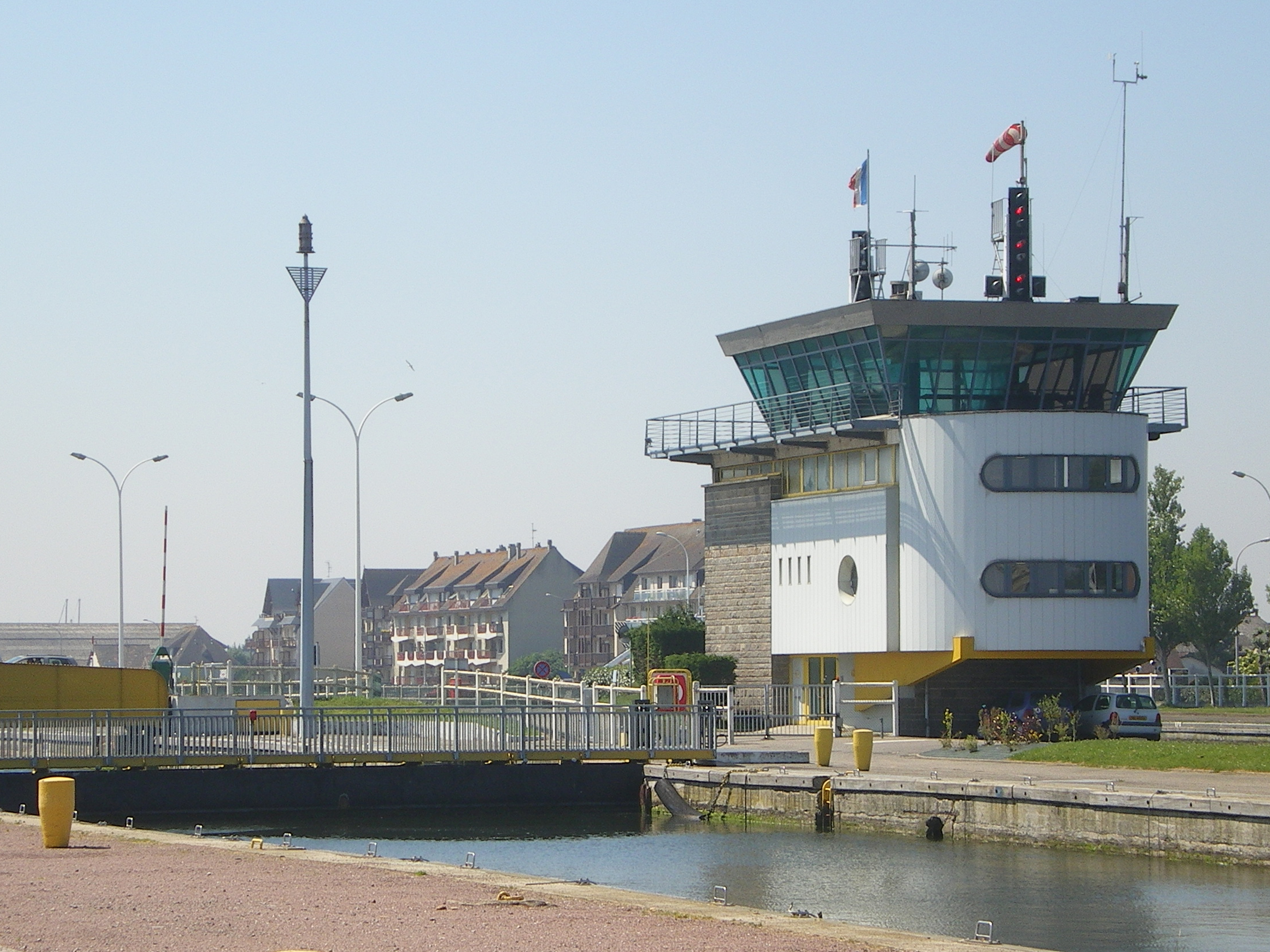 La capitainerie du port de Ouistreham dans le Calvados.